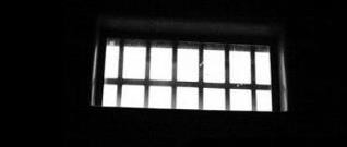 Ґрати Maze Prizon, Annahilt, Northern Ireland, GB